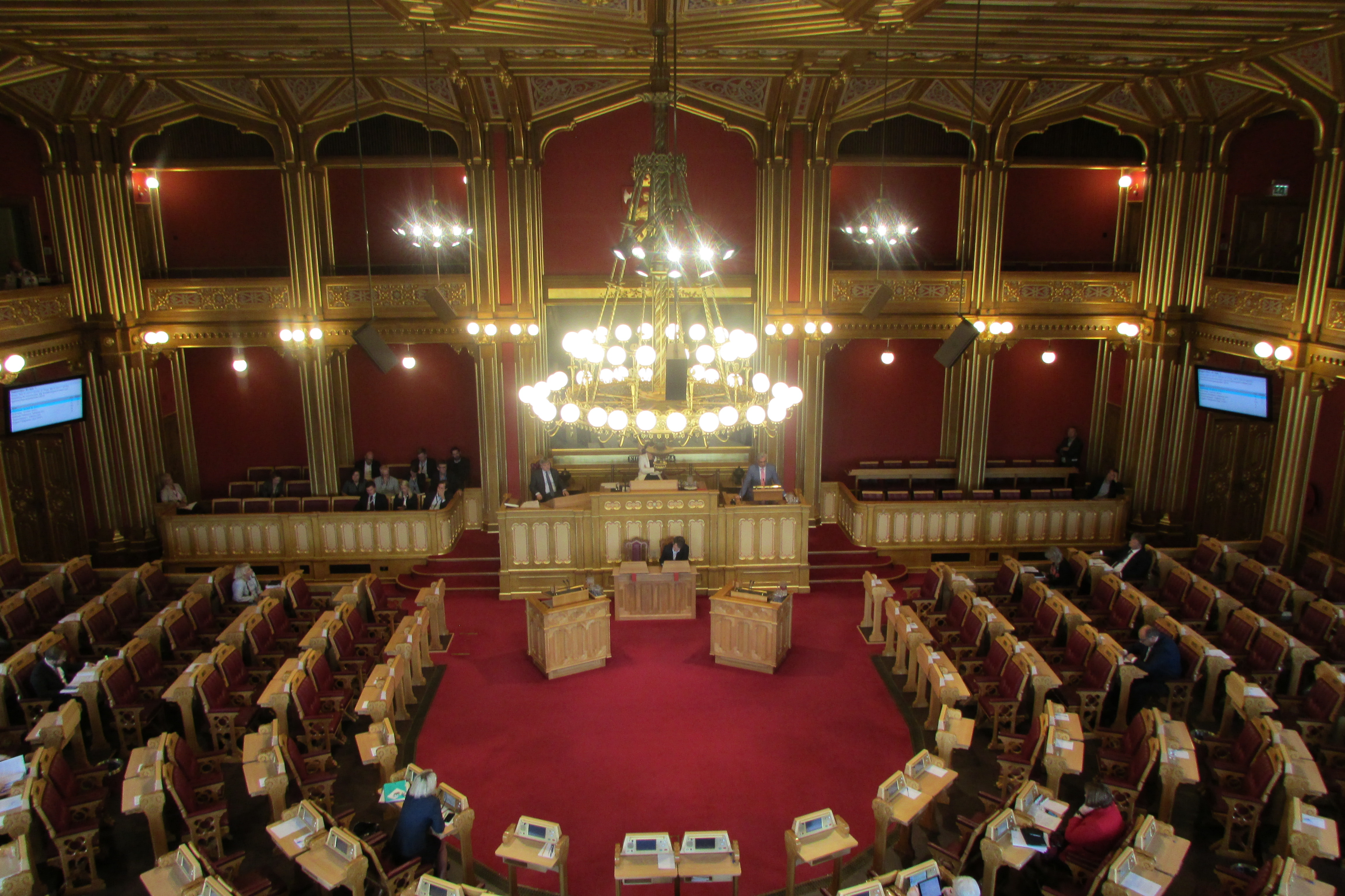 Stortingssalen, Stortingsbygningen